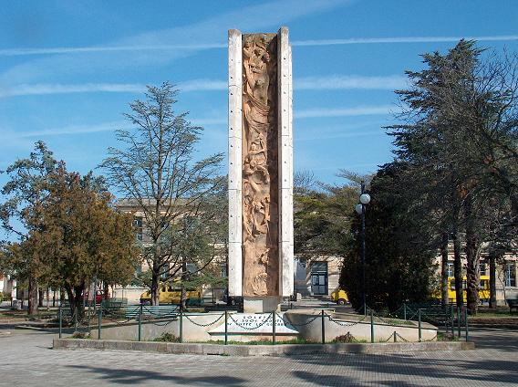 Monumento ai caduti- Comune di Soleto